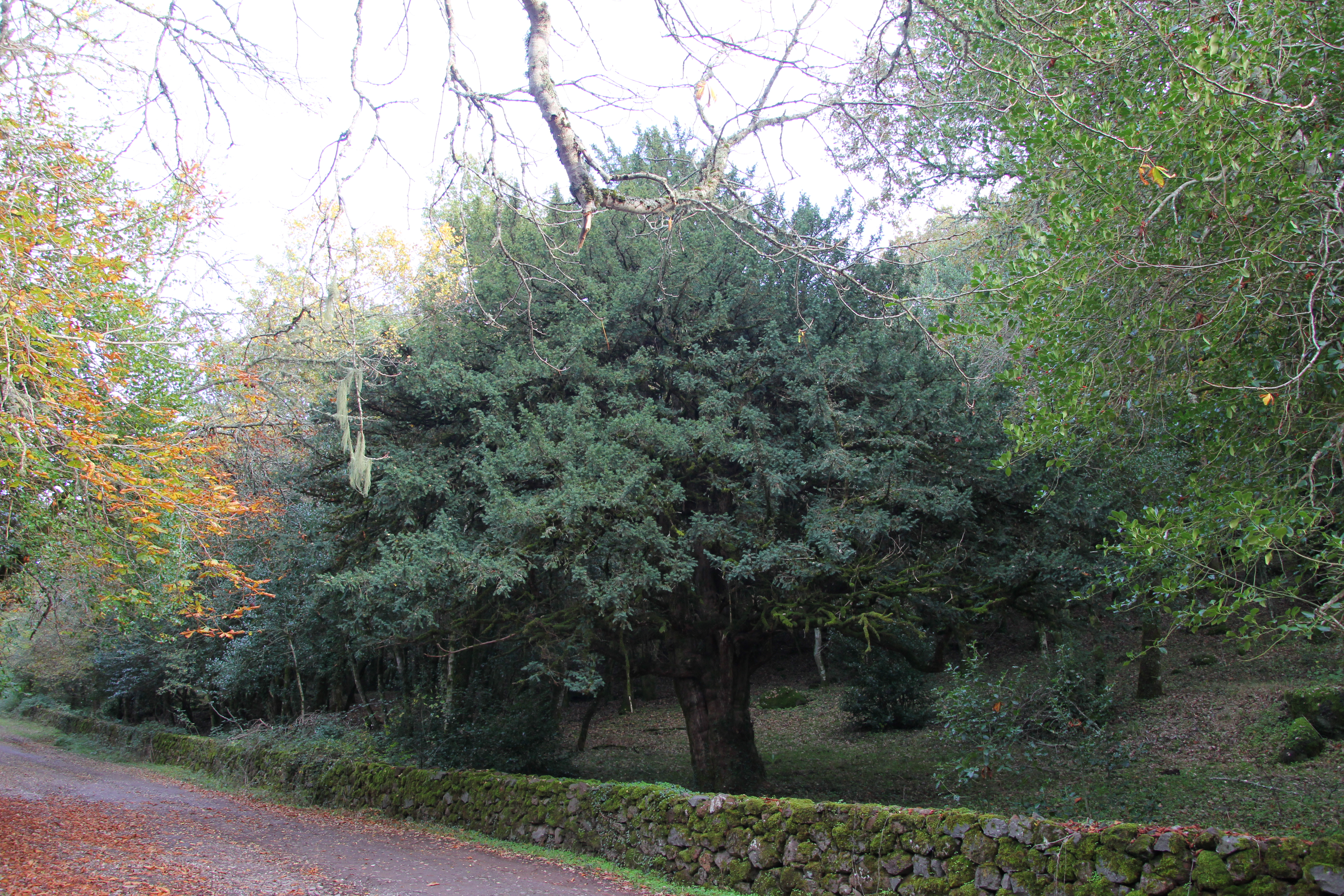 Taxus baccata a Badde Salighes